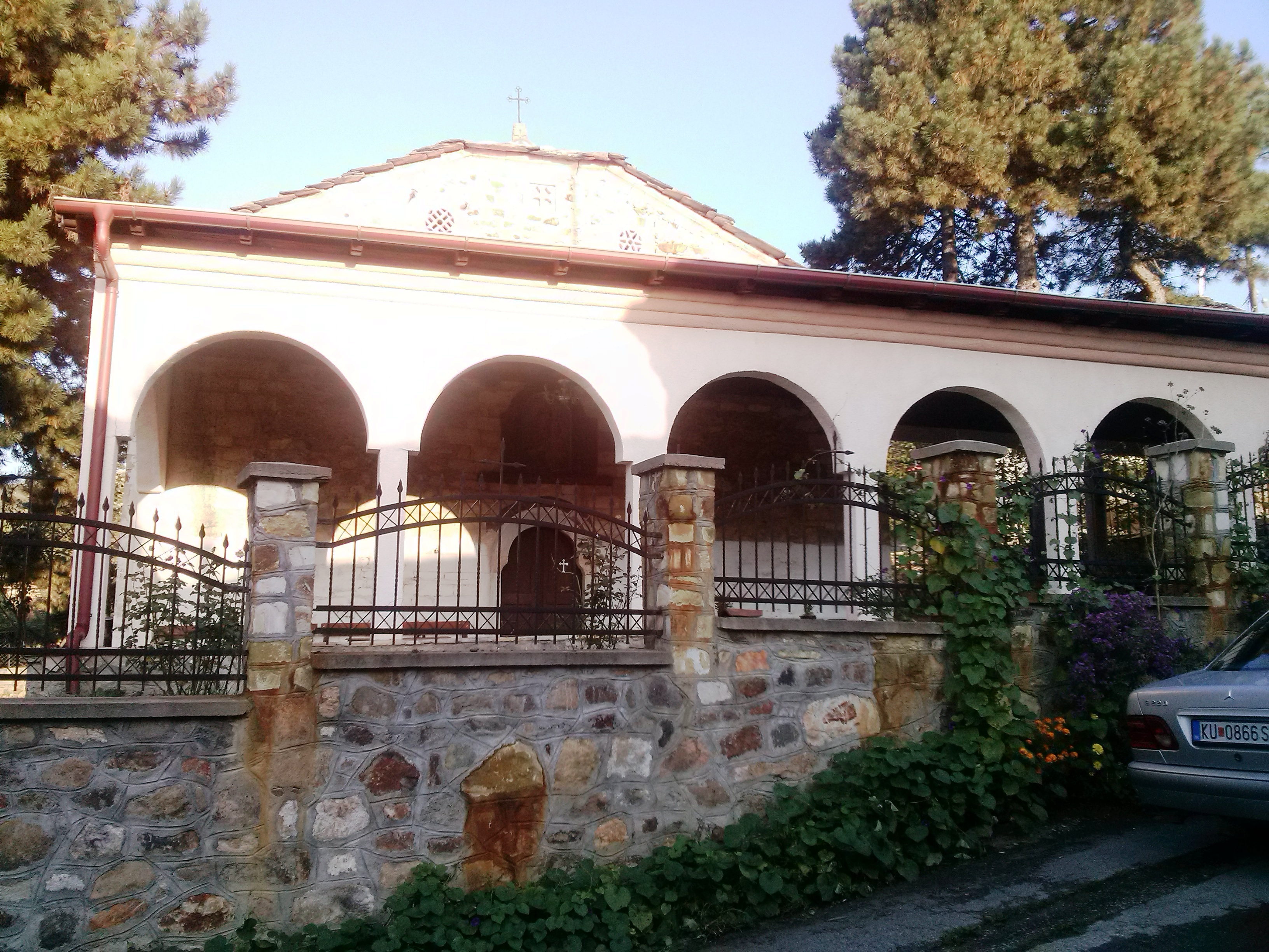 Гробјанска црква, Шлегово